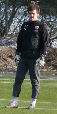 Zlatan Azinovic